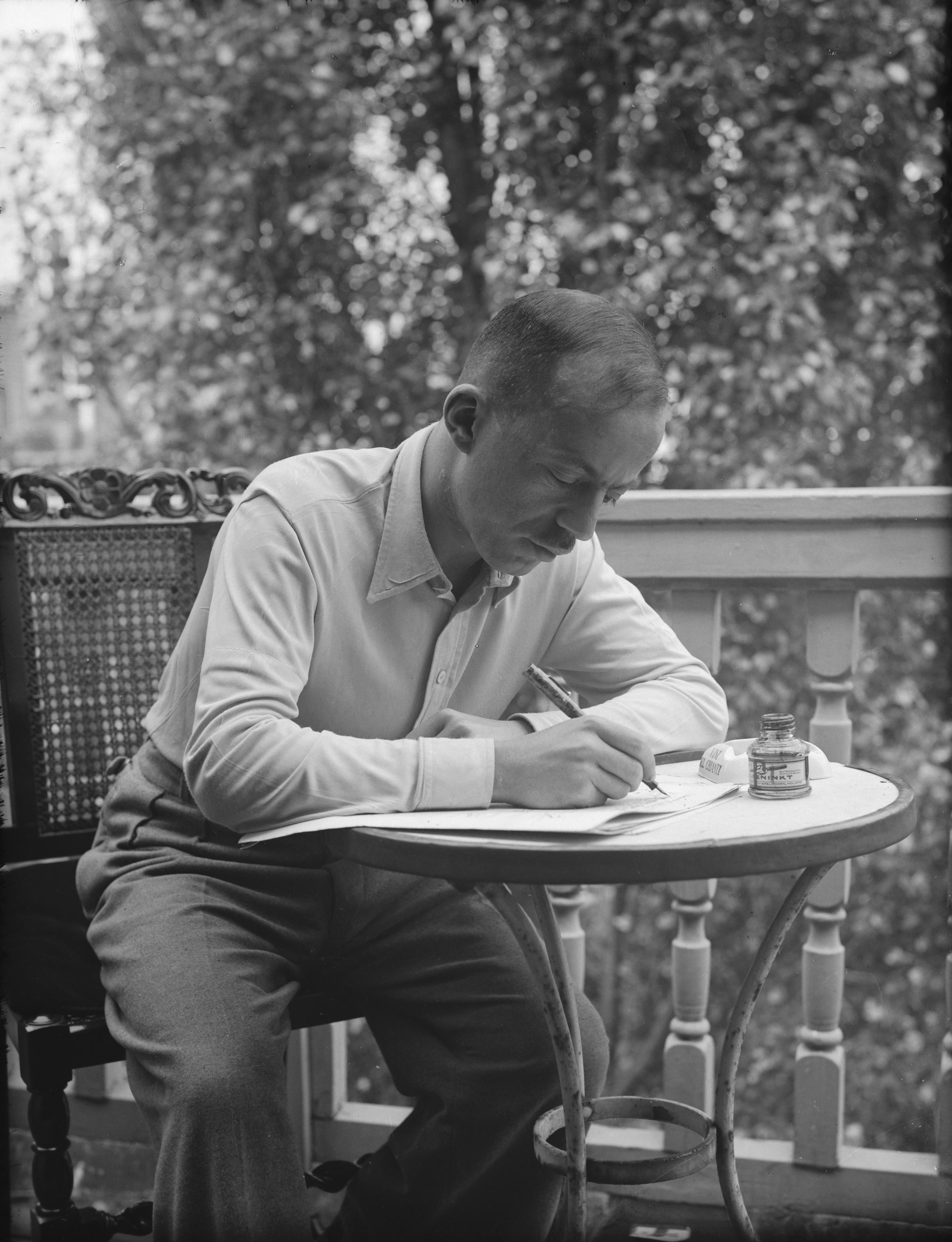 Beschrijving Portret van de componist, pianist en dirigent Géza Frid Documenttype foto Vervaardiger Onbekend Anoniem Collectie Collectie glasnegatieven fotopersbureaus Datering 1935 ca. Inventarissen Afbeeldingsbestand ANWG00552000001 Generated with Dememorixer